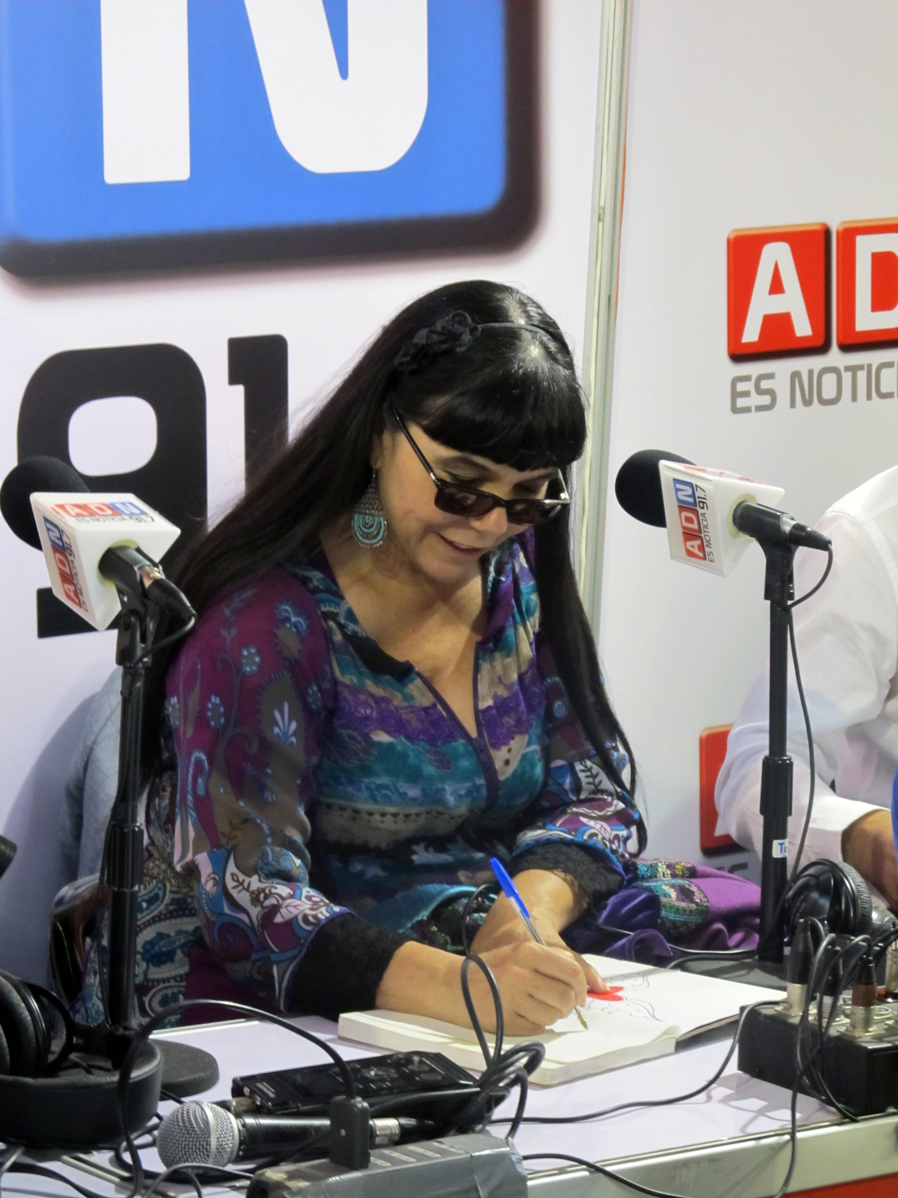 Malucha Pinto, actriz chilena, en FILSA 2014.